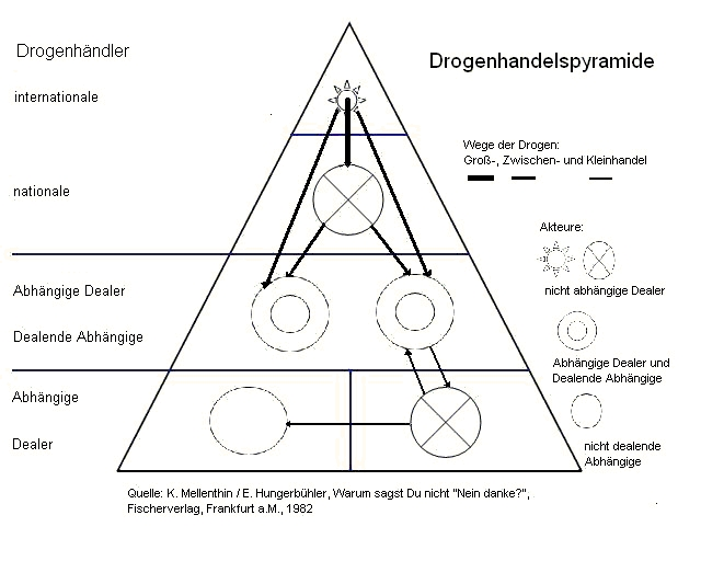 Drogen-Handelspyramide , Germany.